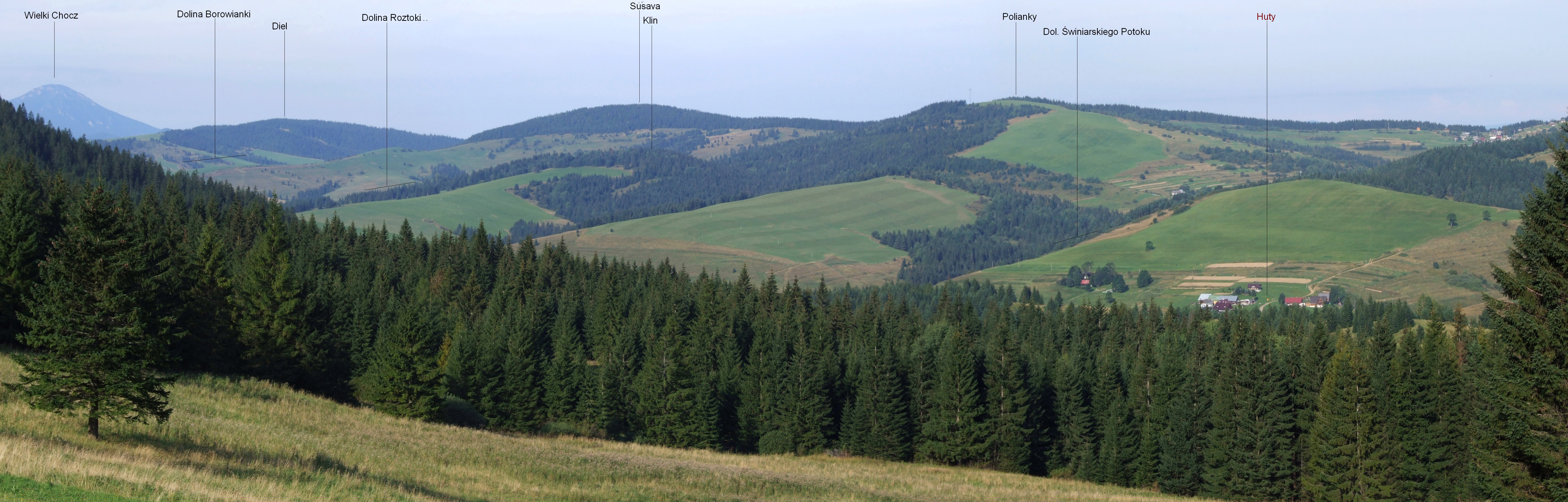 Panorama południowej części Pogórza Orawskiego